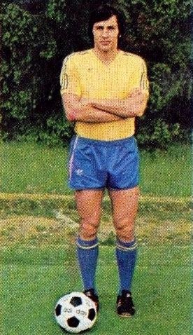 Gérard Soler en 1976 au FC Sochaux, 'Panini Football 1977', Panini figurina n°332.